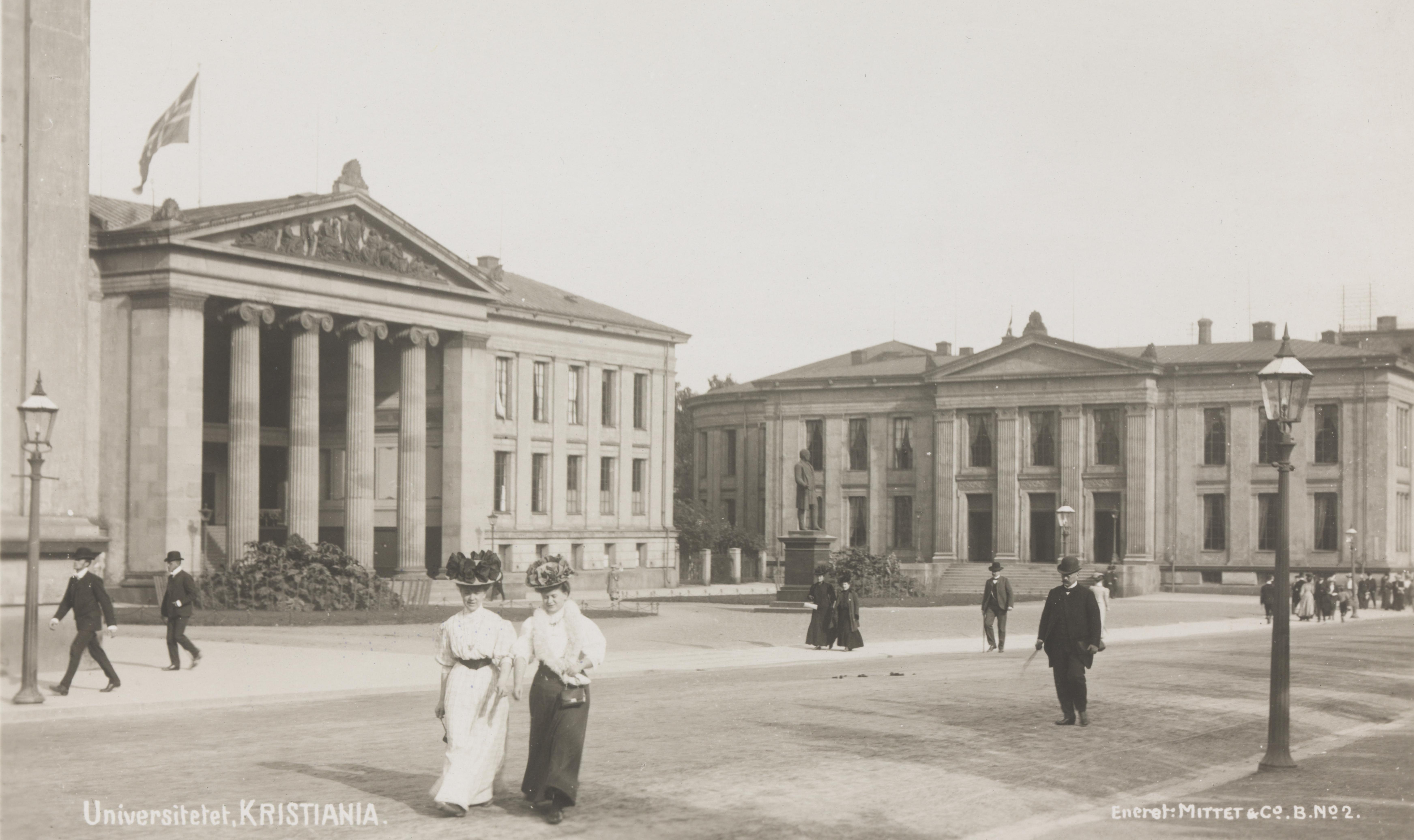 Bildet er hentet fra Nasjonalbibliotekets bildesamling Universitetsbygningene ved Karl Johan, Oslo, Oslo